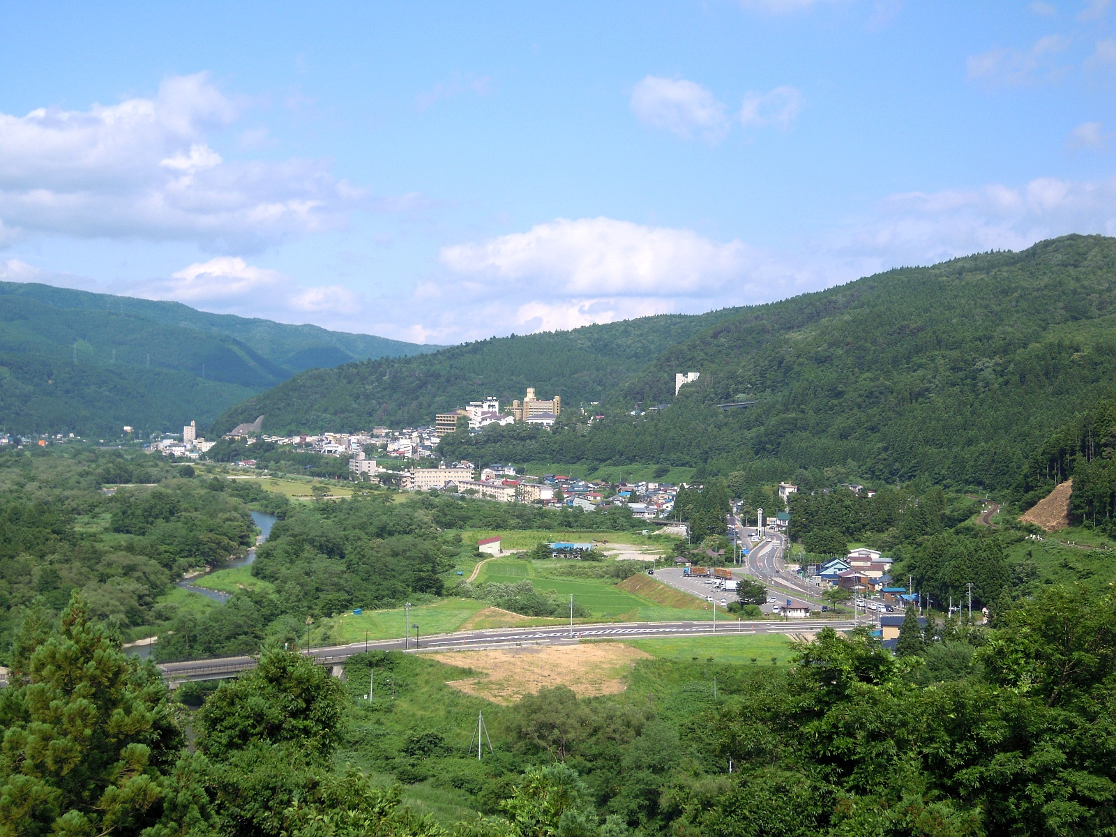 宮城県大崎市の鳴子温泉を南西側に位置する鳴子公園から